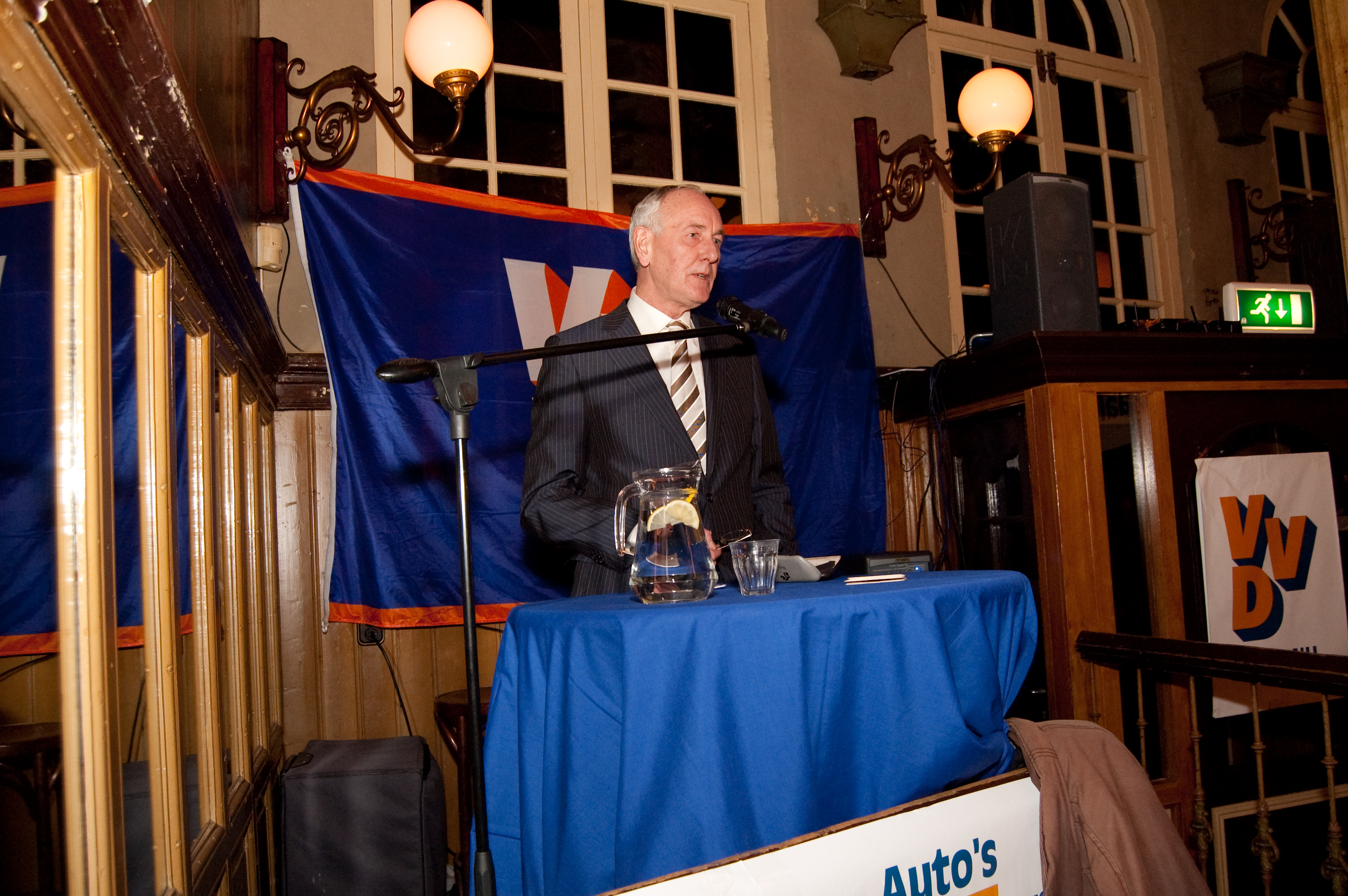 Op 15 februari organiseerde de VVD Leiden een politiek café met tweedekamerlid en voormalig minister van Binnenlandse Zaken en Koninkrijksrelaties Johan Remkes. Het thema van de avond was dezelfde als van de campagneweek: veiligheid.